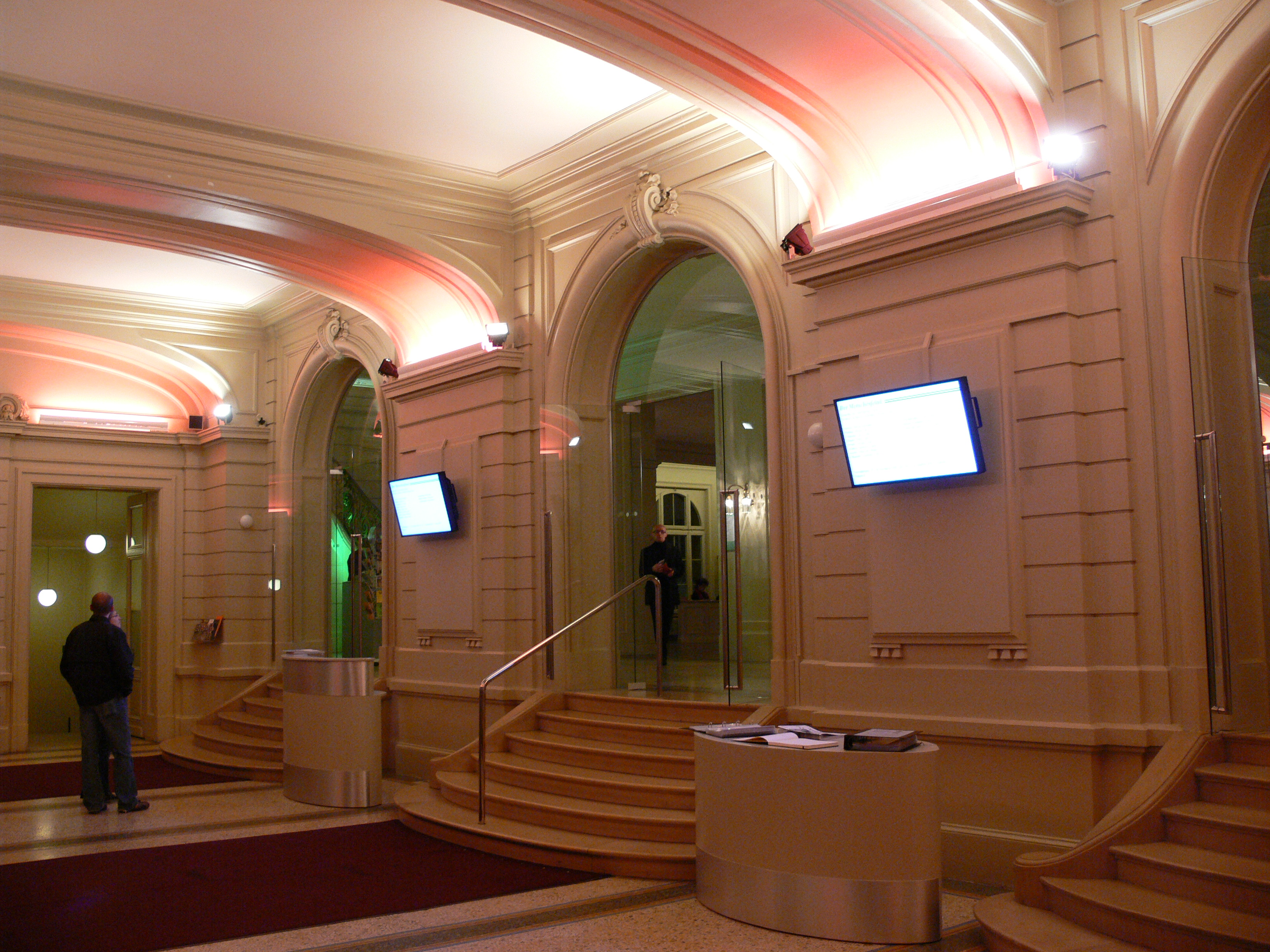 Stadttheater Bern Eingangshalle